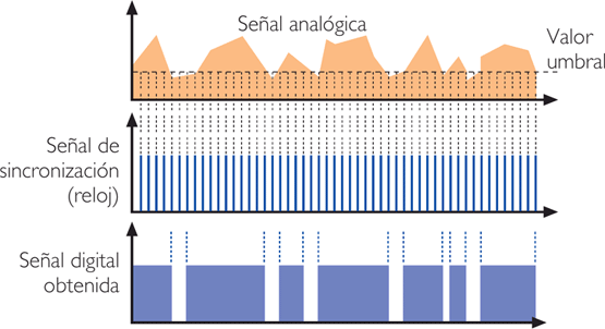 Signal